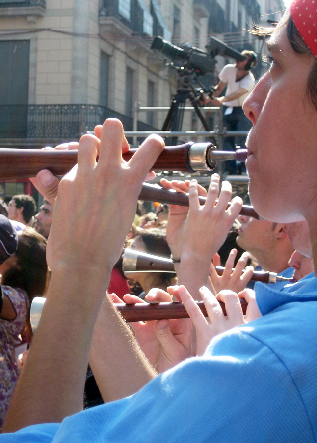 Gralles en l'actuació castellera a la plaça de Sant Jaume de Barcelona per les festes de la Mercè del 2007